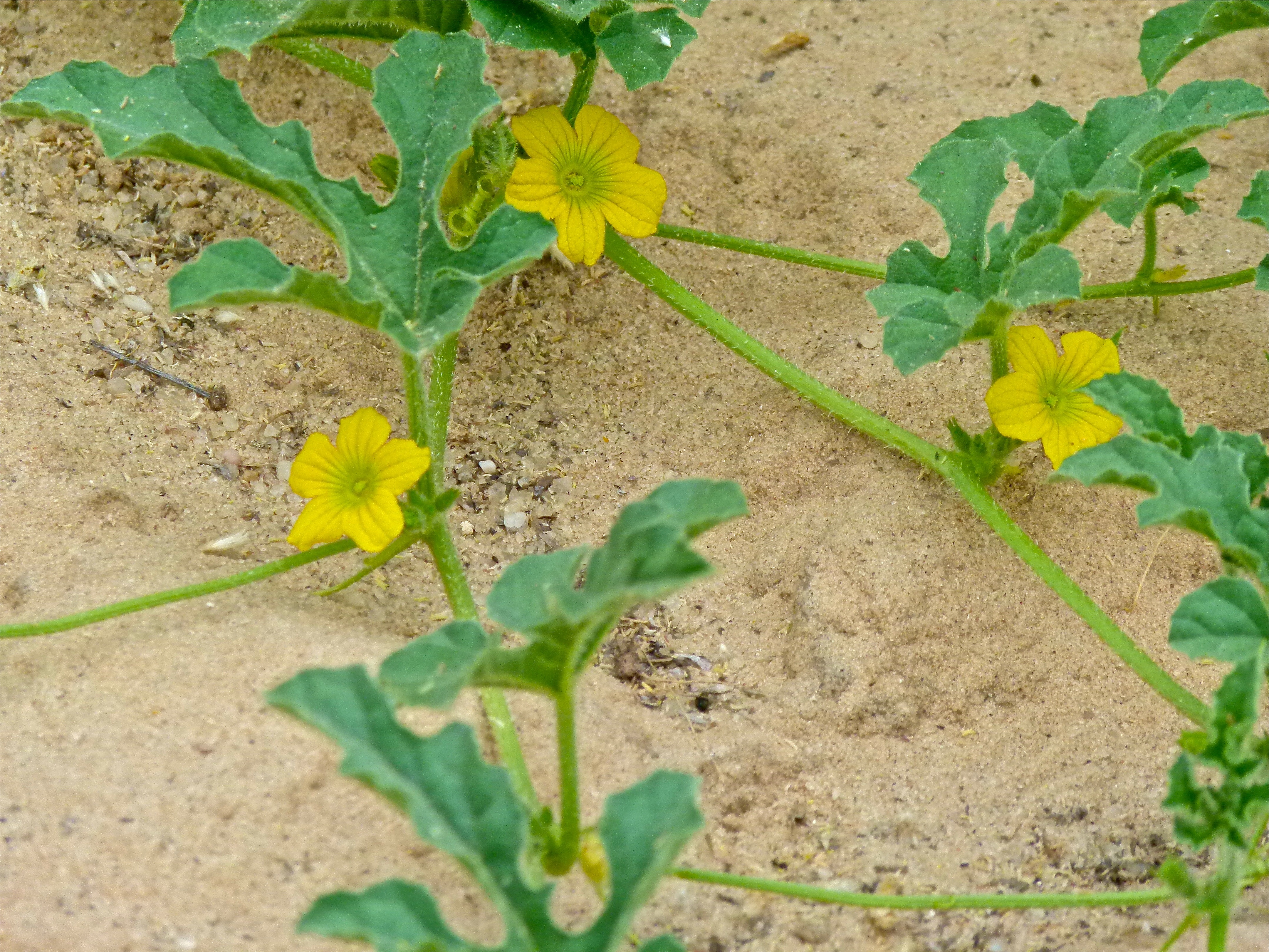 Nossob Riverbed, Kgalagadi Transfrontier Park, SOUTH AFRICA